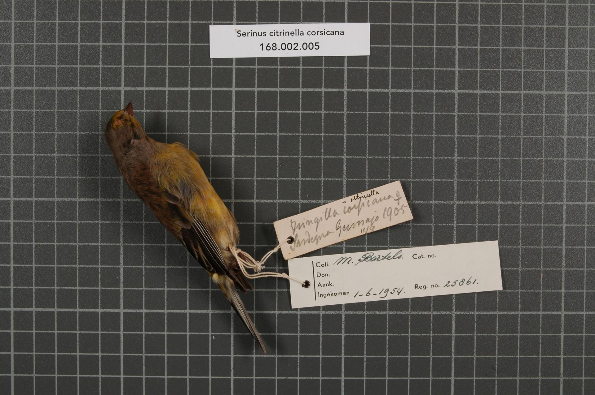 Serinus citrinella corsicana (Koenig, 1899)